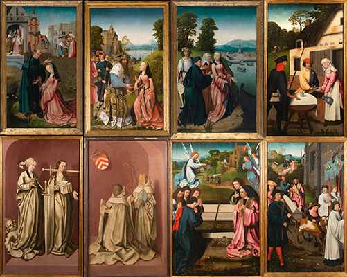 Goswyn van der Weyden, Dymphna, 1505, olieverf op eiken panelen, 120 x 71 x 5,5 cm